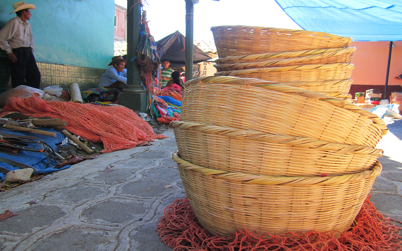 Canastos tipicos